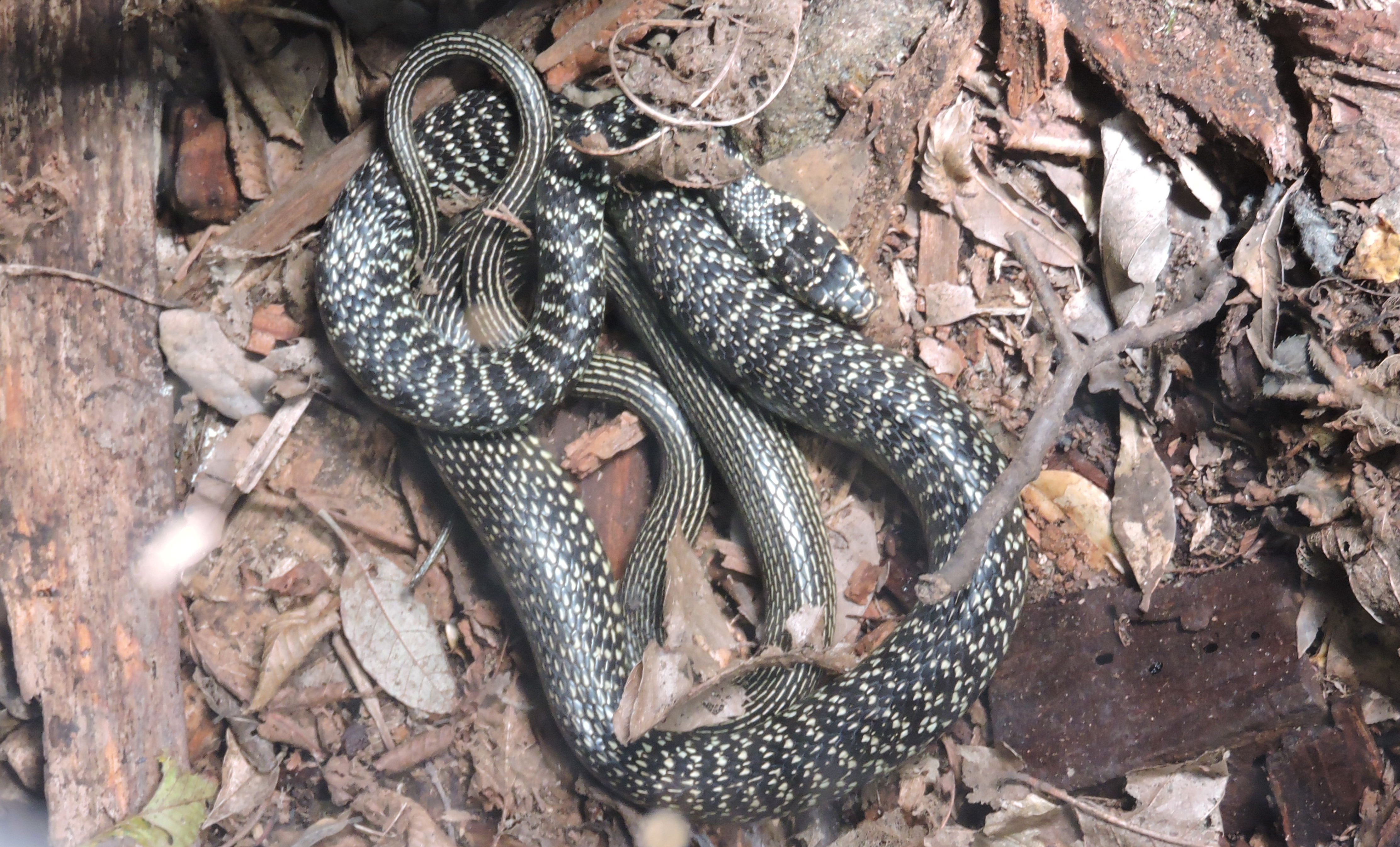 Punta Baffe - Punta Moneglia - Val Petronio (Q55317052)